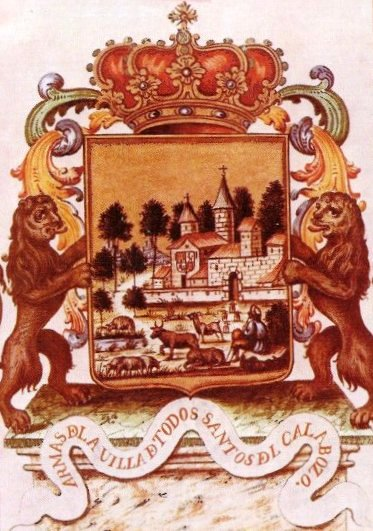 Escudo de la Villa de Todos los Santos de Calabozo.